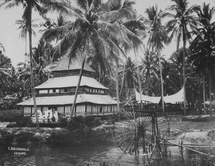 foto. Een waterrad in een rivier met zwemmende kinderen voor een moskee te Pajakoemboeh, met een Minangkabau raadhuis op de achtergrond